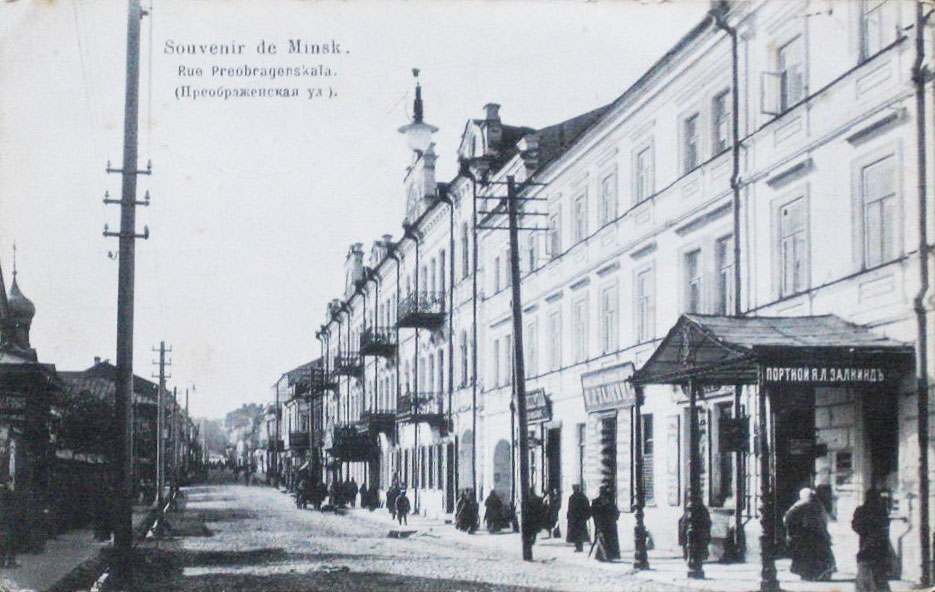 Беларуская (тарашкевіца): Менск (Miensk), вуліца Зборавая (vulica Zboravaja). Гатэль Гарні